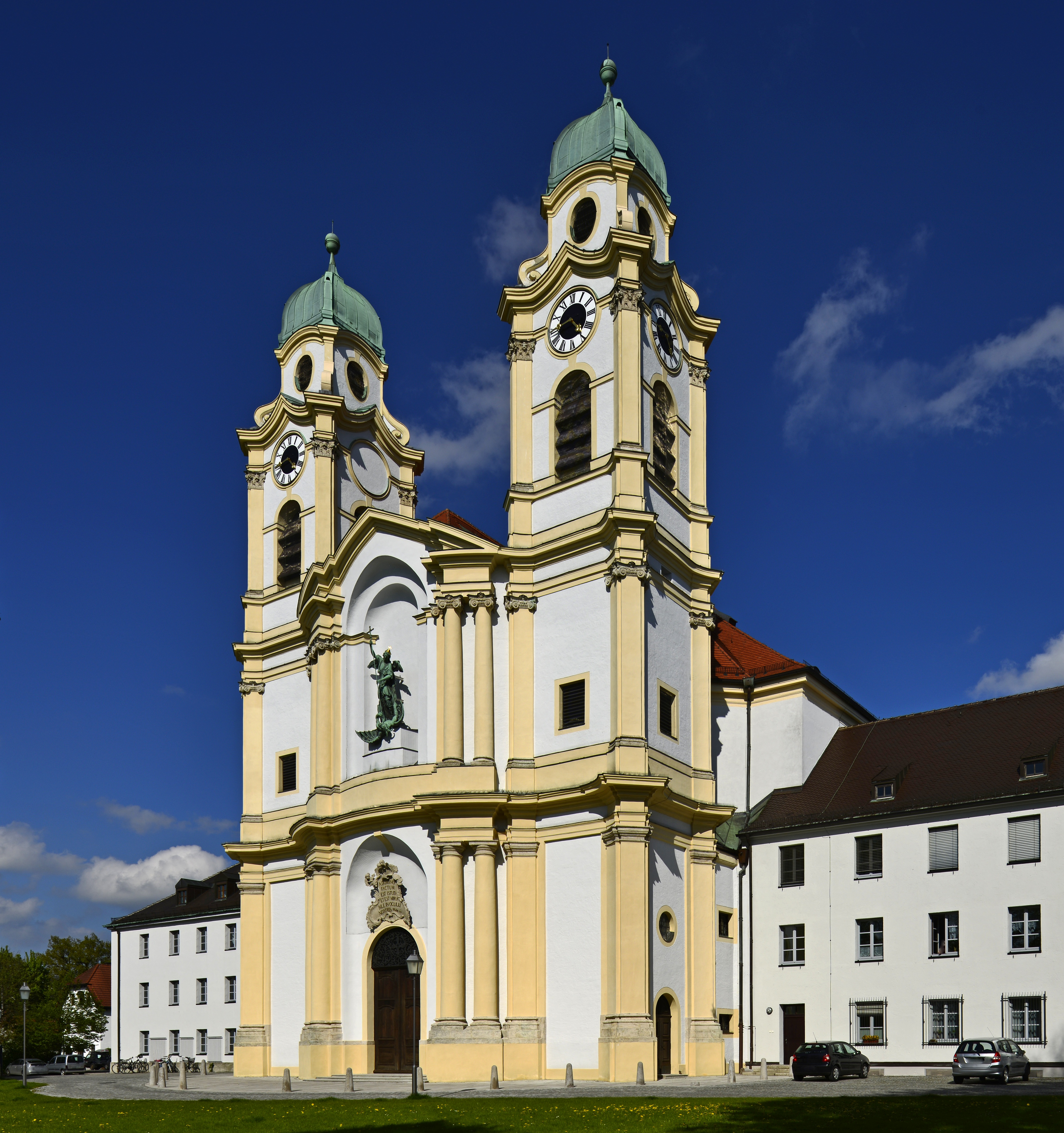 München, Berg-am-Laim, Sankt Michael. Die im Mai 2016, nach nahezu 20 jähriger Renovierung, durch den Architekten Franz Peter, wieder abgeschlossene Aussenfassade.